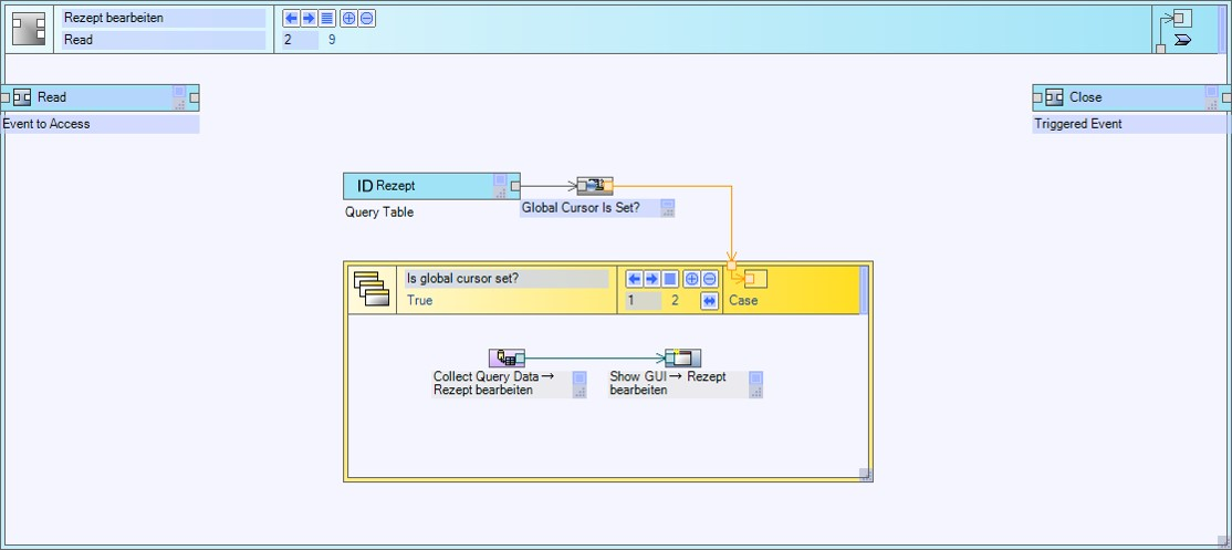 Moduldiagramm aus Posity